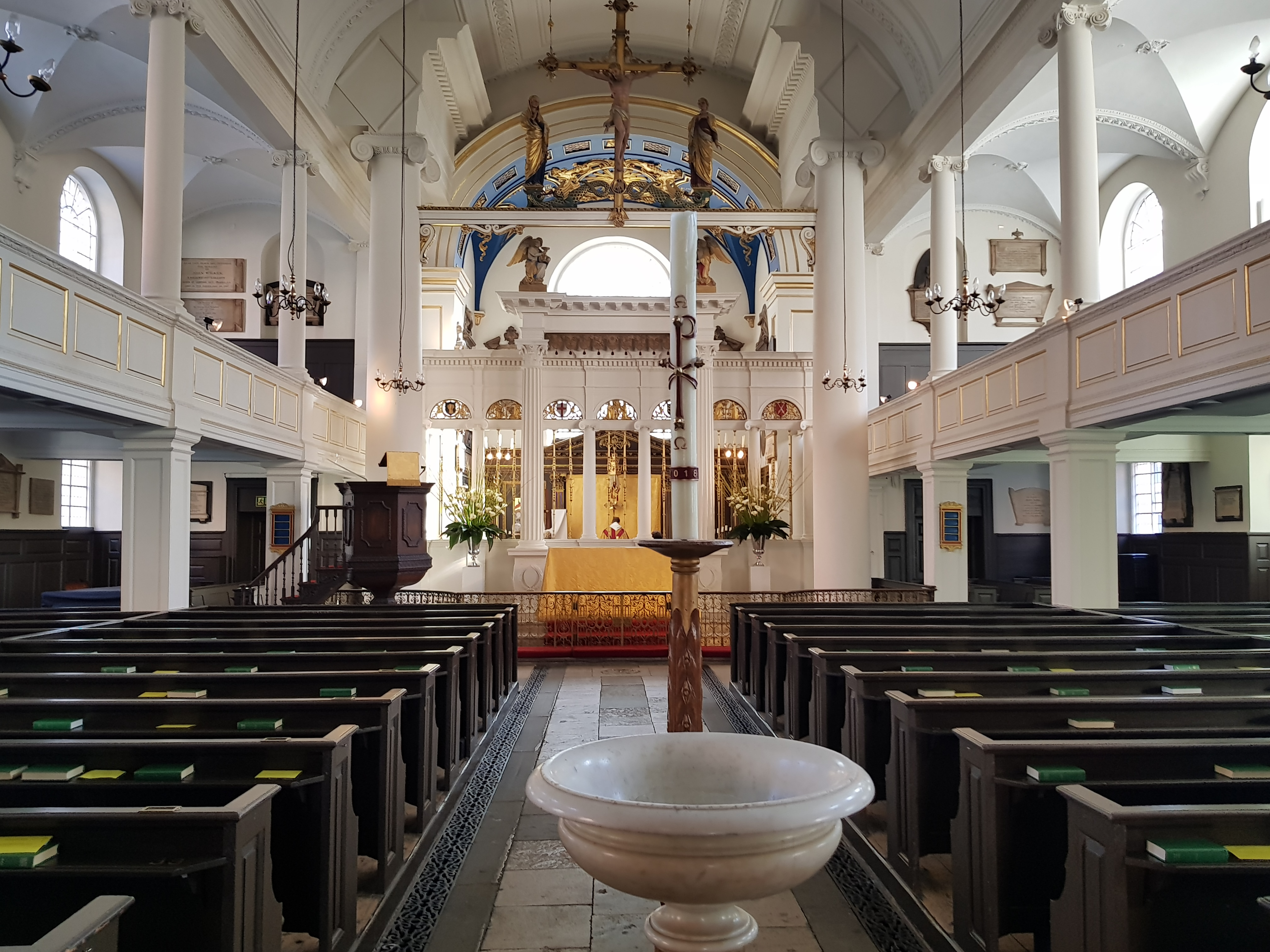 Vue intérieure de la chapelle Grosvenor, Mayfair, Londres.